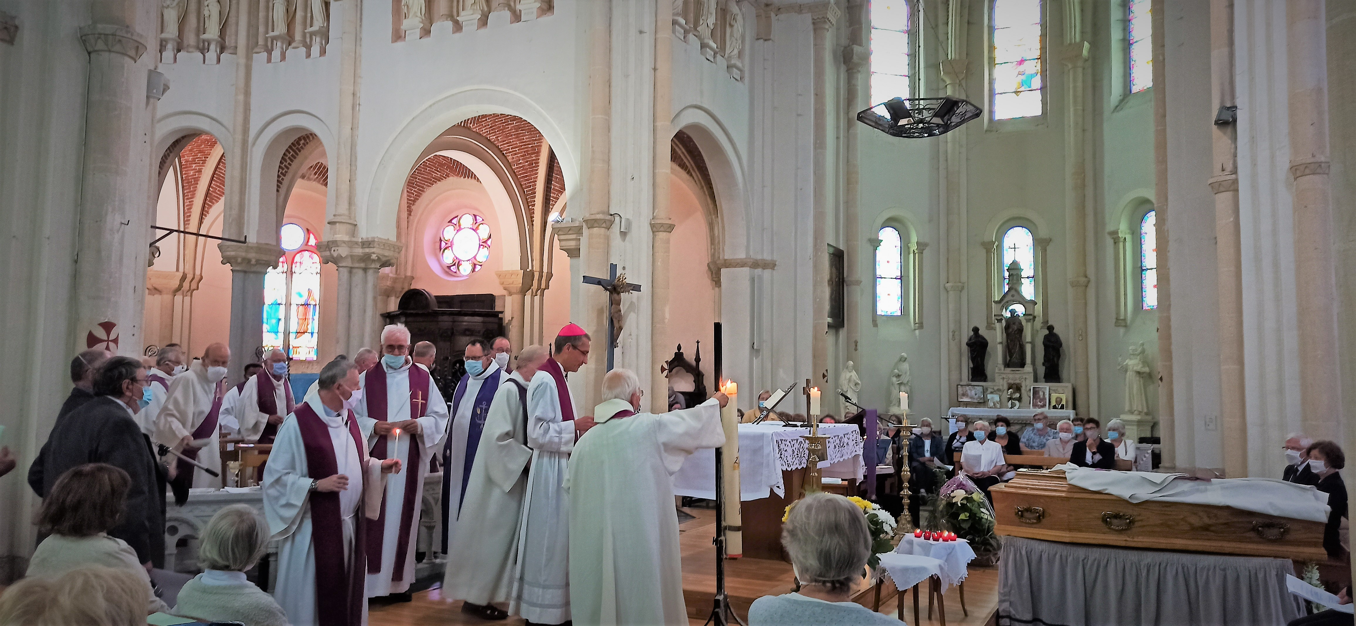 Vincent Dollmann à Auberchicourt en l'église de la visitation lors de la messe suite au décès père Guy Seulin (25-10-1933 Fressain - 19-07-2020)